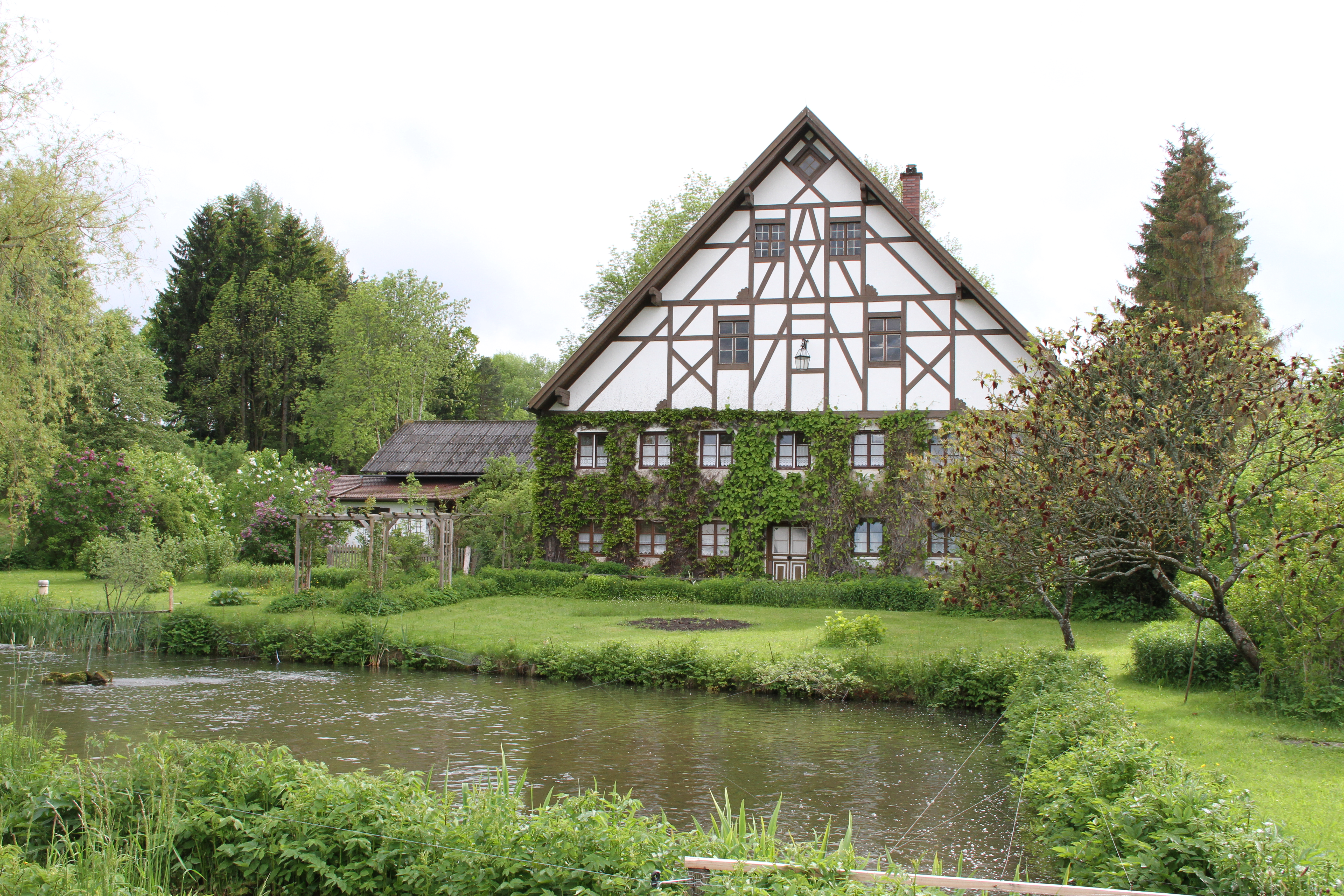 Oberbeuren am 30.5.2010, Forellenteich vor der alten Mühle. Salzstraße 13